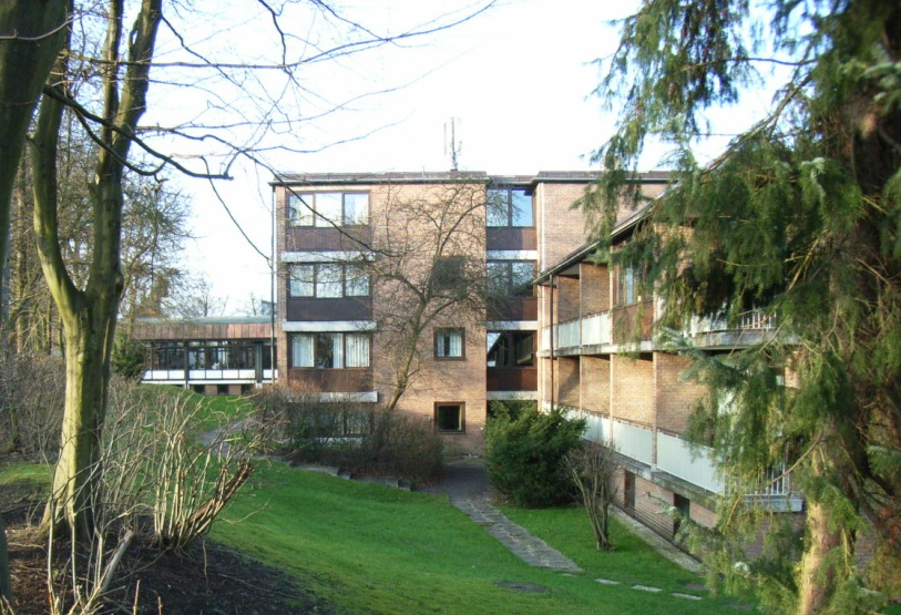 Studentenwohnanlage Europa-Kolleg im Windmühlenweg Hamburg-Groß Flottbek